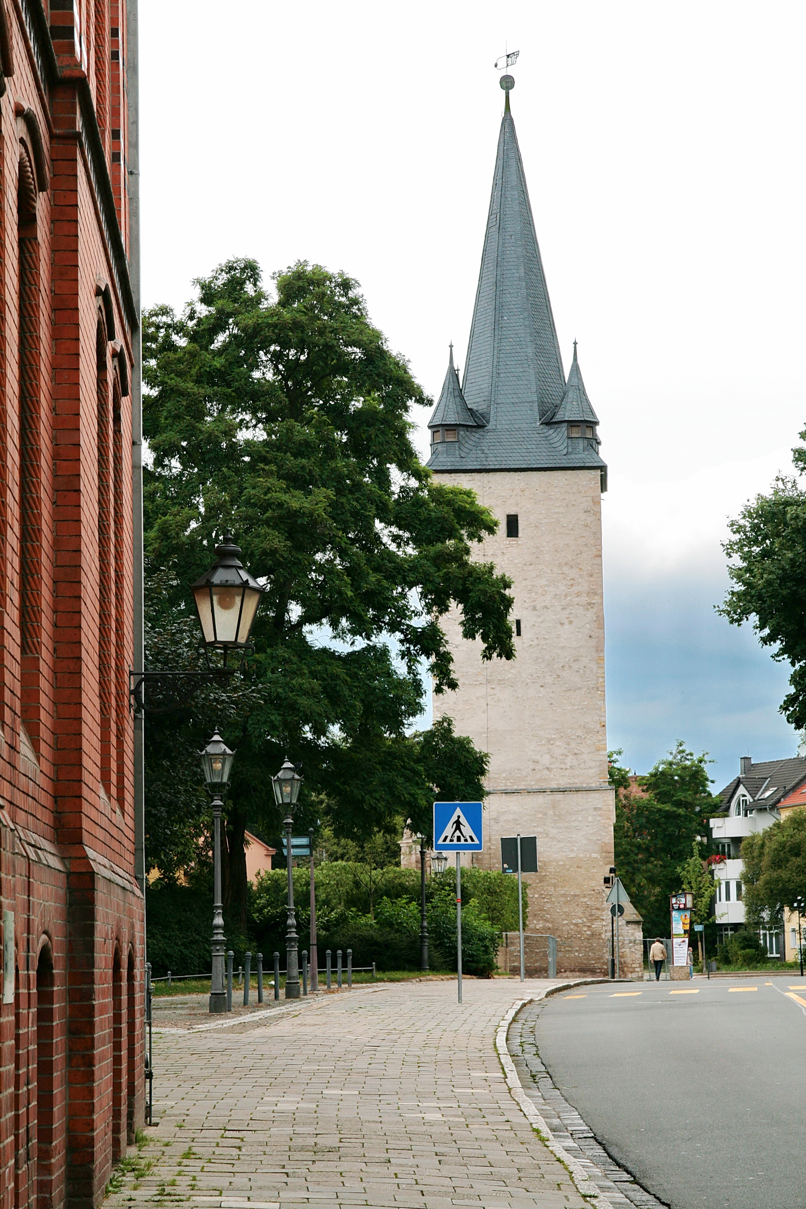 Der Johannisturm von 1380 ist von den einst fünf Stadttoren der einzig erhaltene Torturm der Stadt Aschersleben, Sachsen-Anhalt, Deutschland